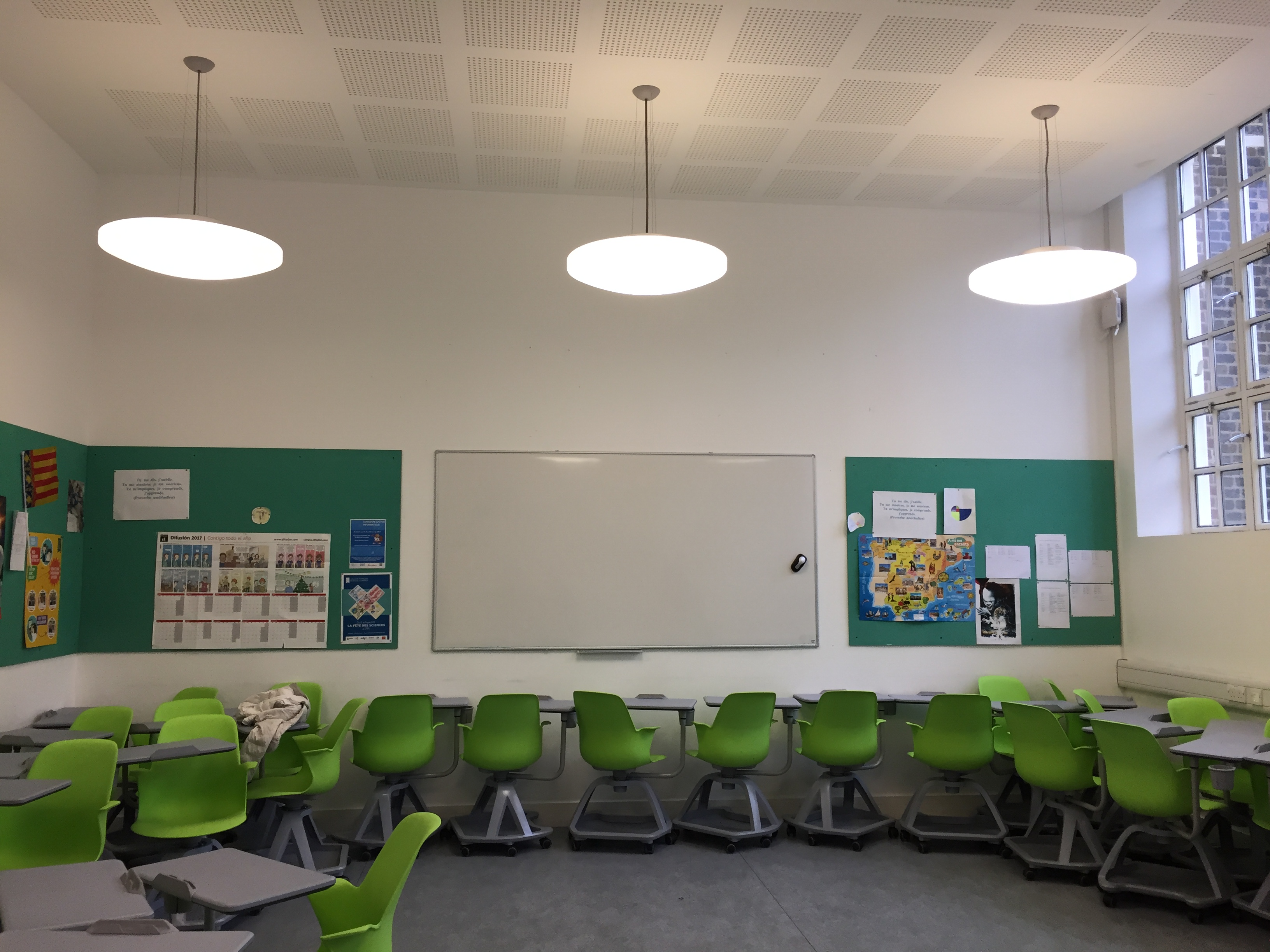 Une nouvelles classe pour travaux en groupe. Elle permet aux élèves de se déplacer facilement grâce aux chaises roulantes mises à disposition.